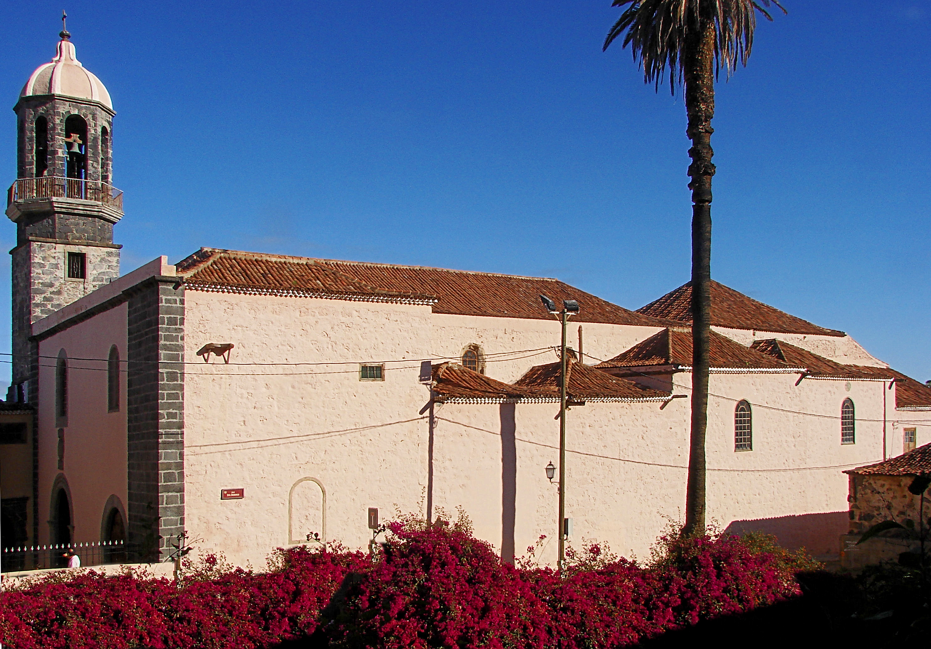 Iglesia Santo Domingo